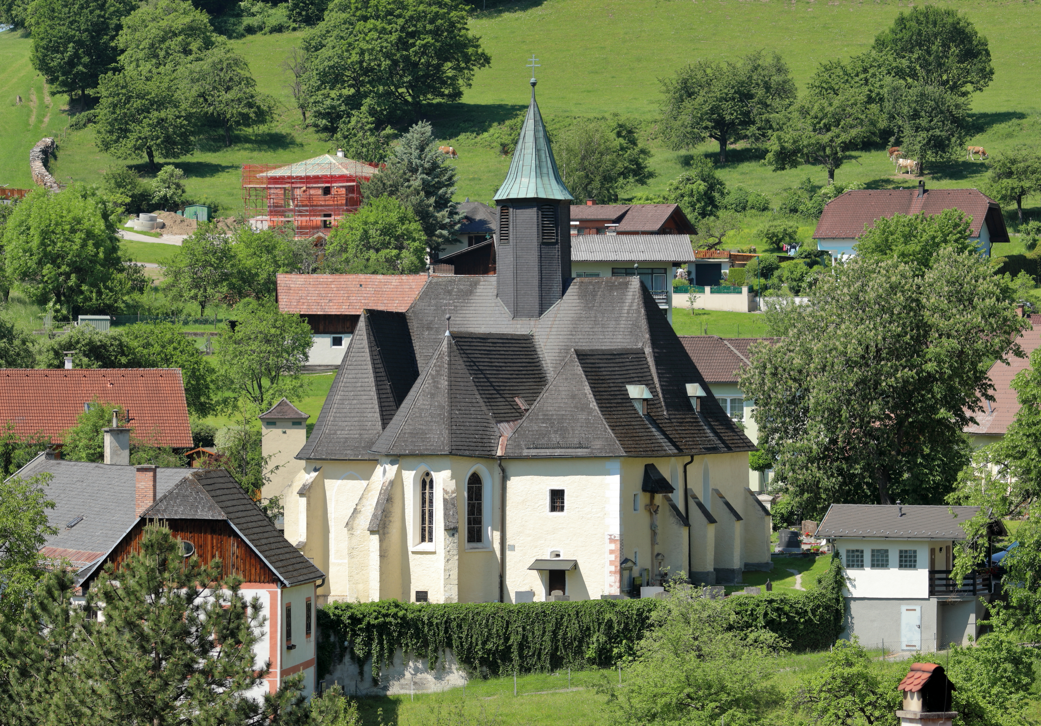 Ostnordostansicht der röm.-kath. Pfarrkirche hl. Nikolaus in der niederösterreichischen Gemeinde Prigglitz.